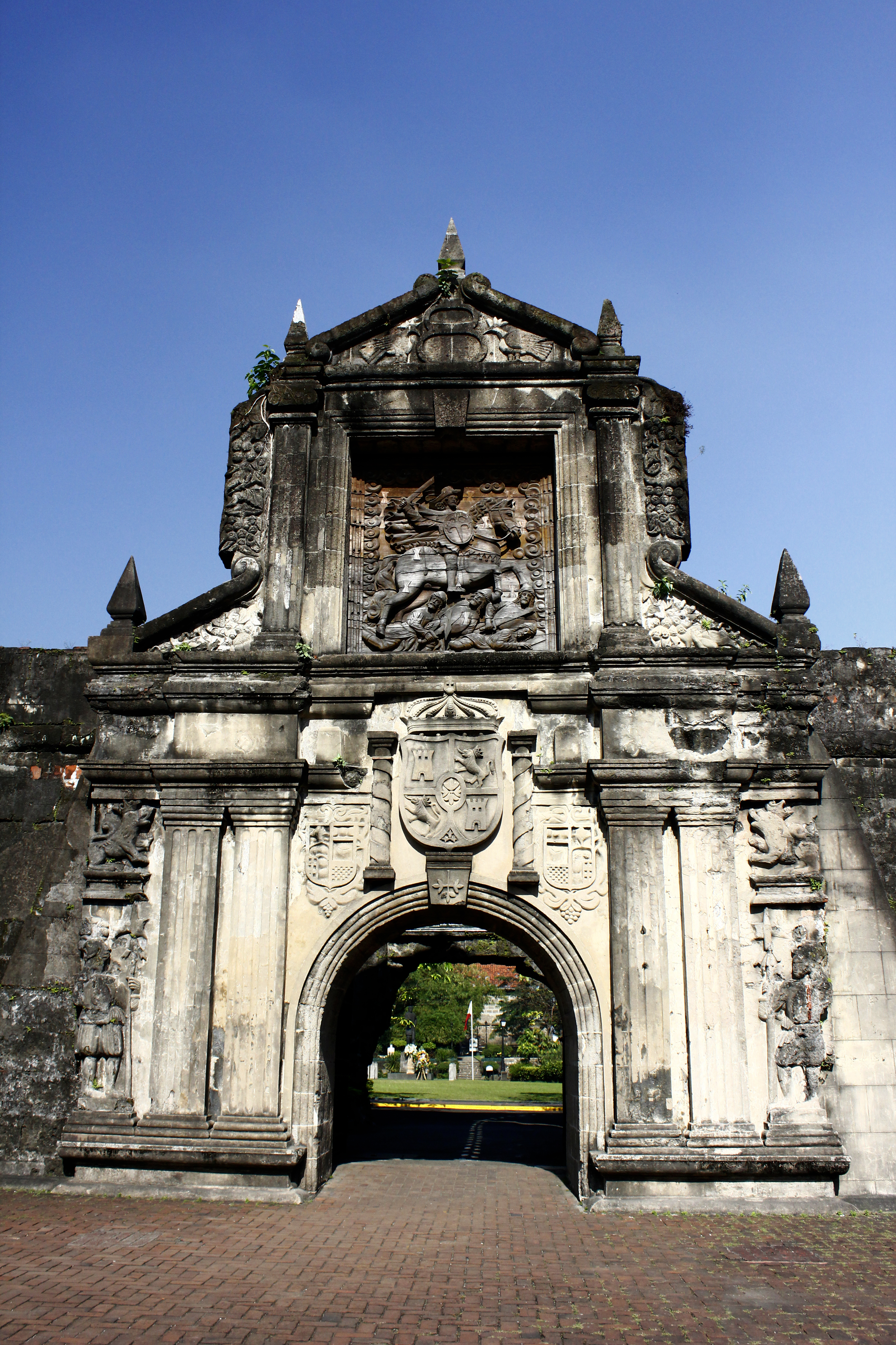 Arco del Fuerte de Santiago, en Manila. Fue construido originalmente en 1714 y reconstruida tras las Segunda Guerra Mundial debido a los daños sufridos.